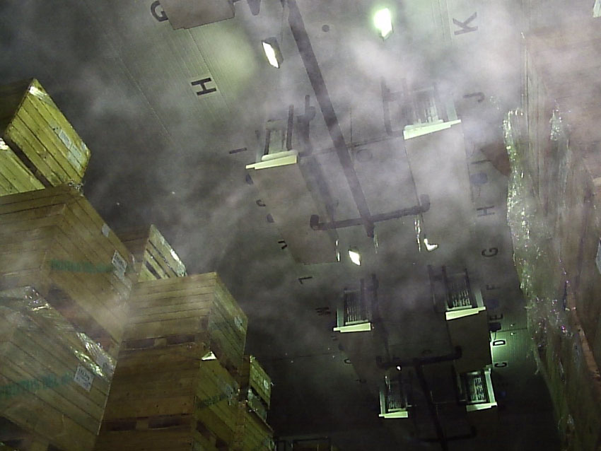 Evaporadores tipo nabo industriales de tipo inundados para R717 en cámara de conservación de planta frigorífica. San Francisco de Mostazal, Chile